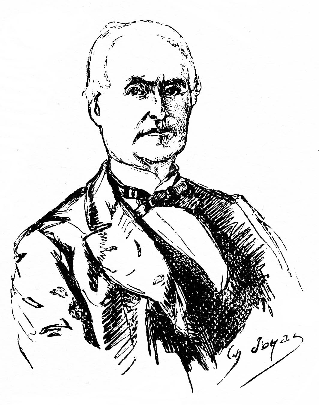 Lézat, par Charles Jouas. Vignette de couverture, tome II de "Cent Ans aux Pyrénées", de Henri Beraldi.